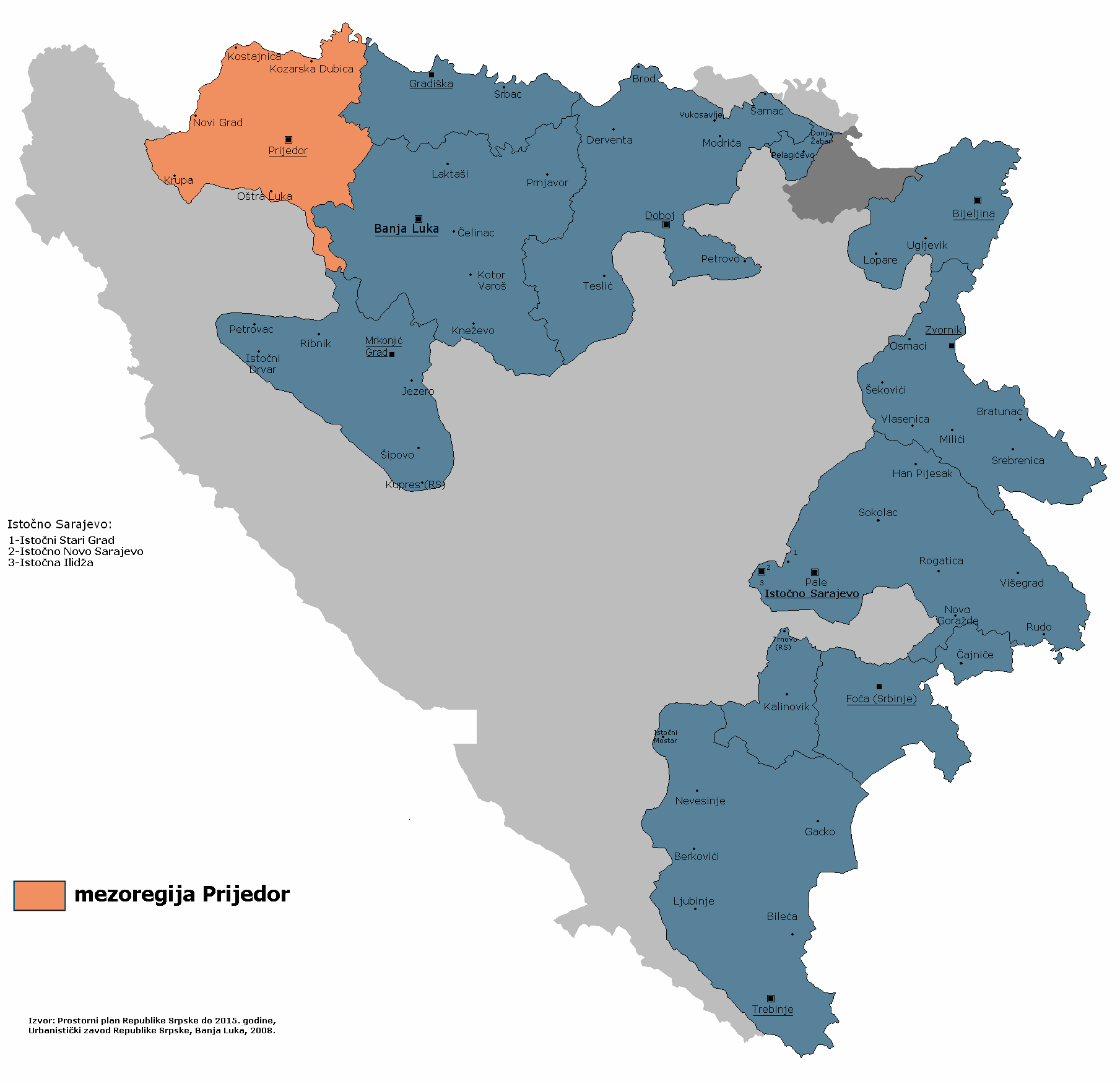 Регион (мезорегион) Приедор в составе Республики Сербской